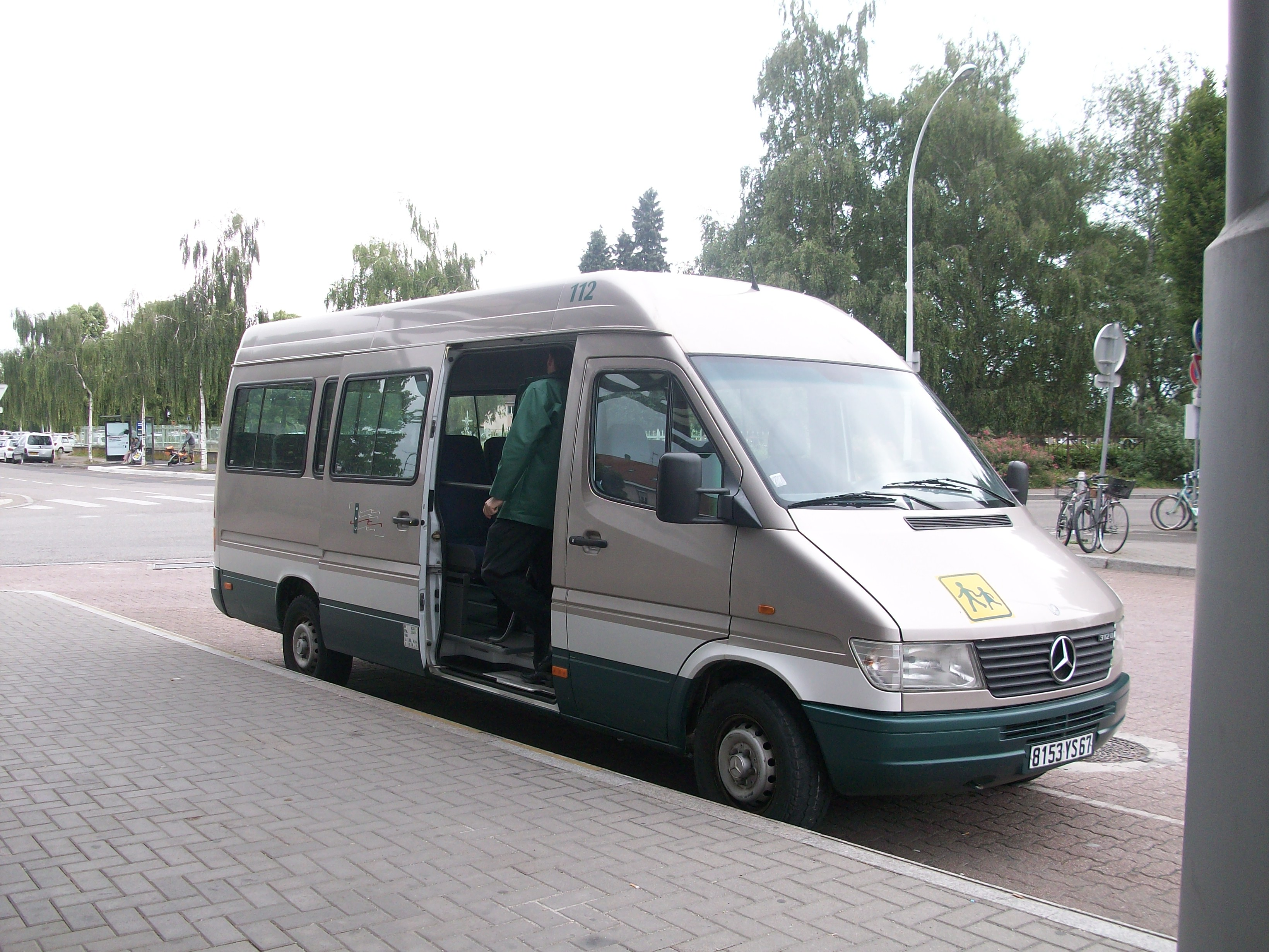 Mercedes-Benz Sprinter de la CTS, à Strasbourg